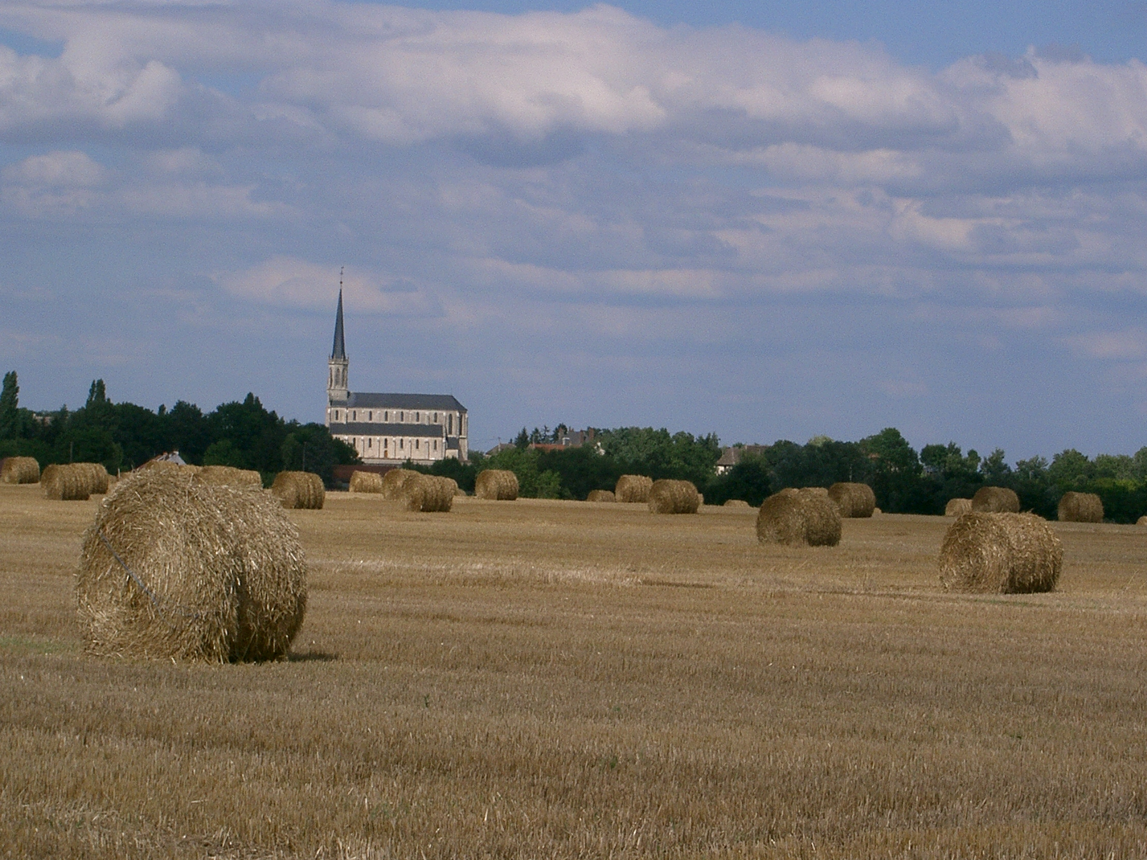 église de Labergement-les-Seurre (21) et moissons